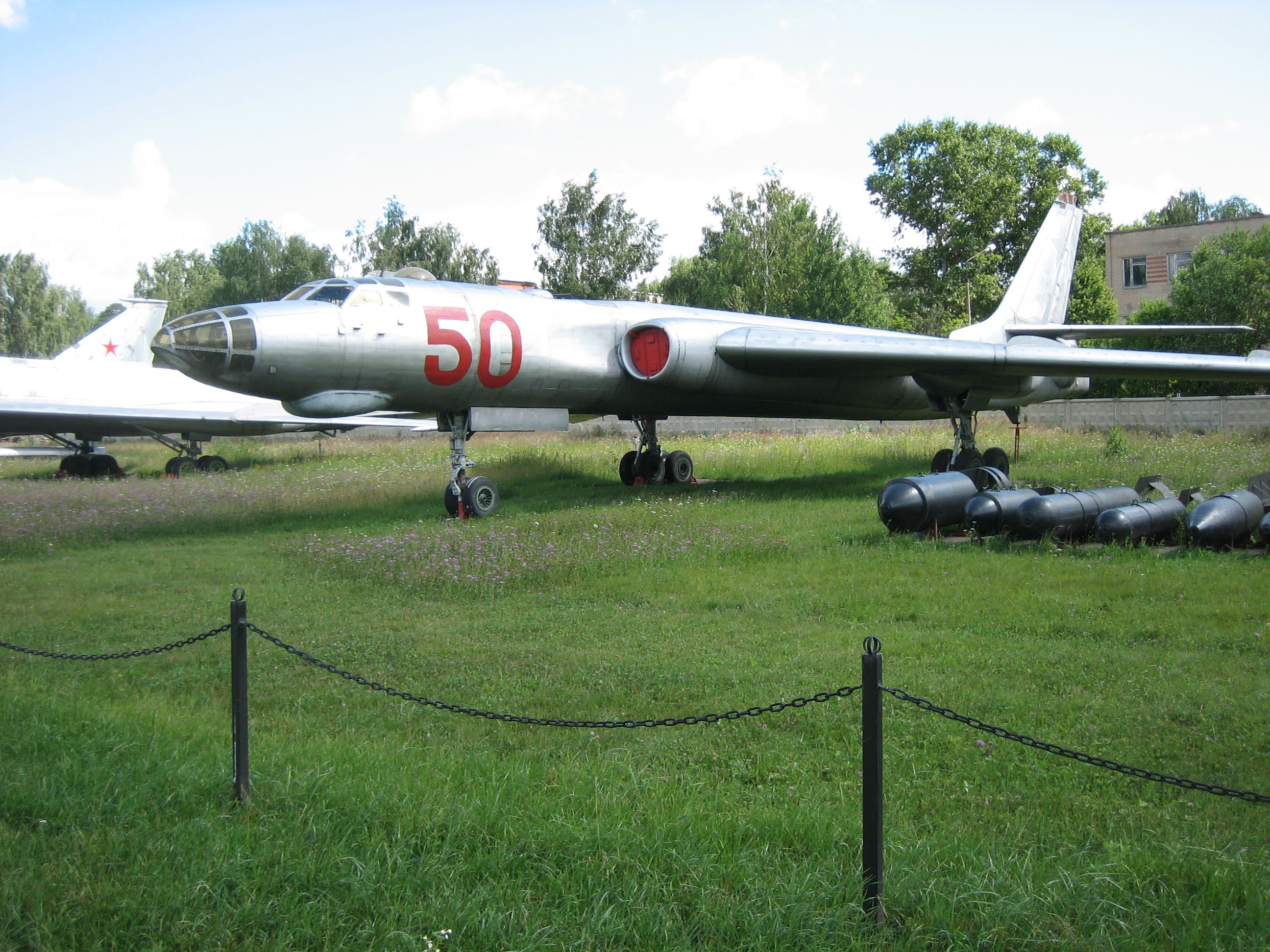 Tu-16 в Монино